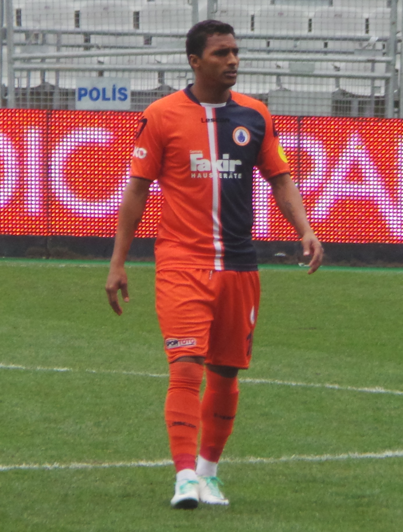 Doka Madureira'